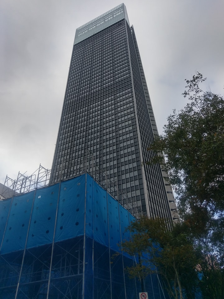 在臺北市信義區松仁路拍攝興建中的臺北南山廣場。